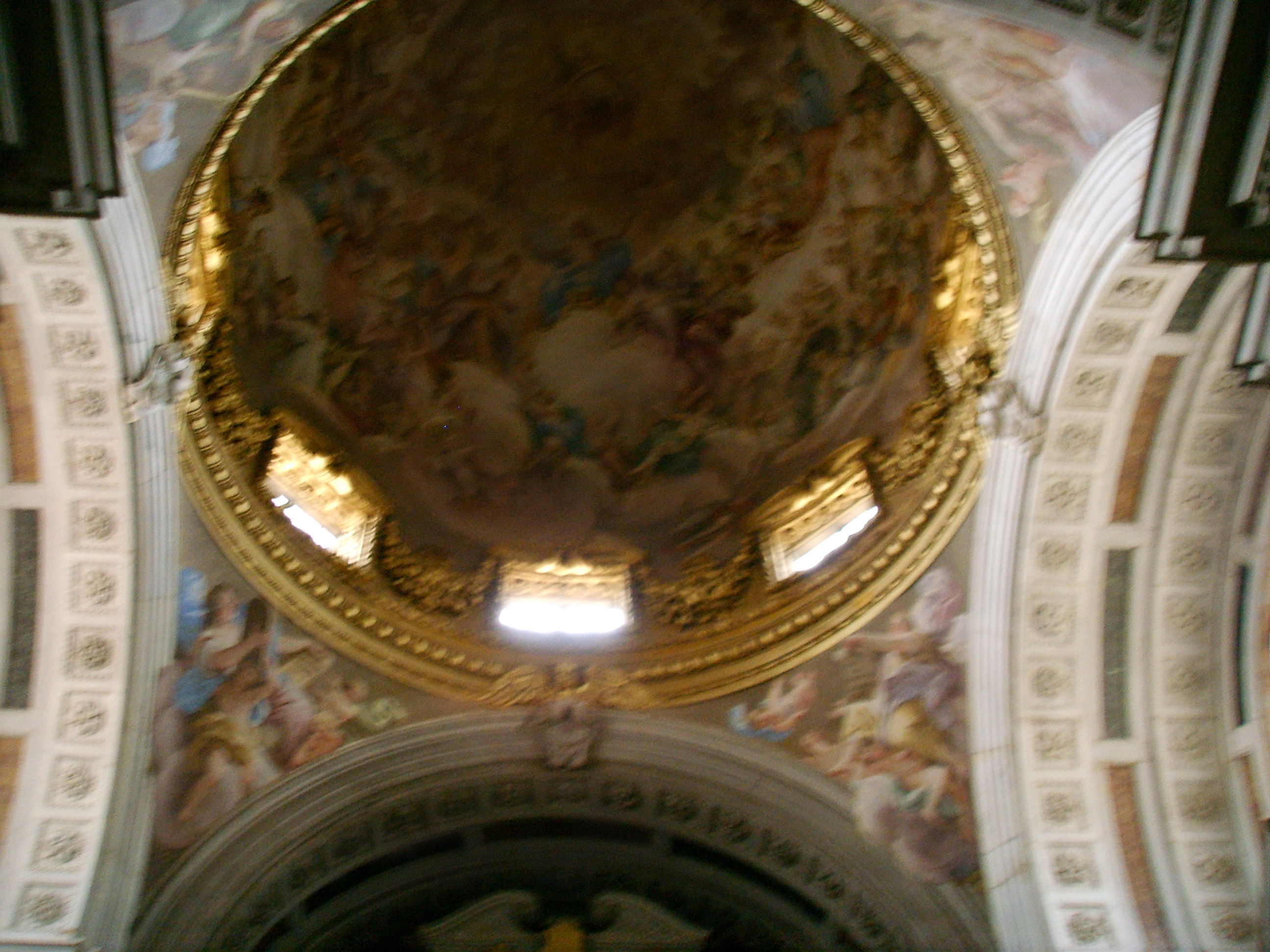 Santa Maria del Carmine, Corsini Chapel, inside, Florence, Italy